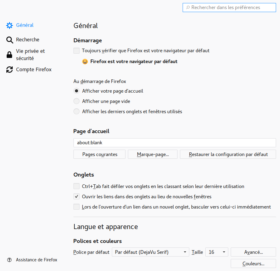 Page des préférences du navigateur Mozilla Firefox version 59.0.2 sur Ubuntu 18.04 (en français de France).